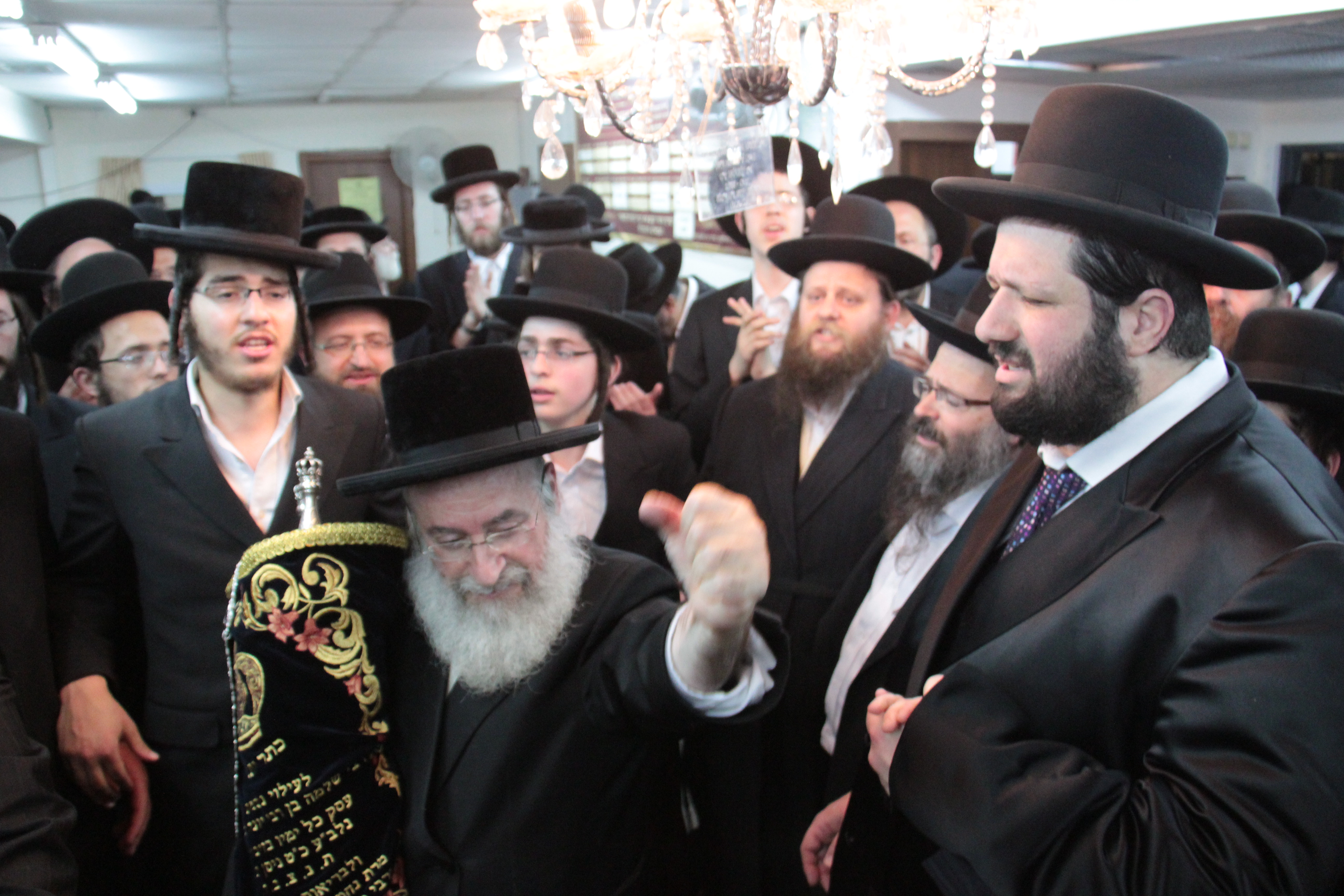 Sefer Torah in memory of Rabbi Shlomo Shtenzel in Beitar Illit Featuring Rabbi Asher Weiss Rabbi yonatan Shtencel